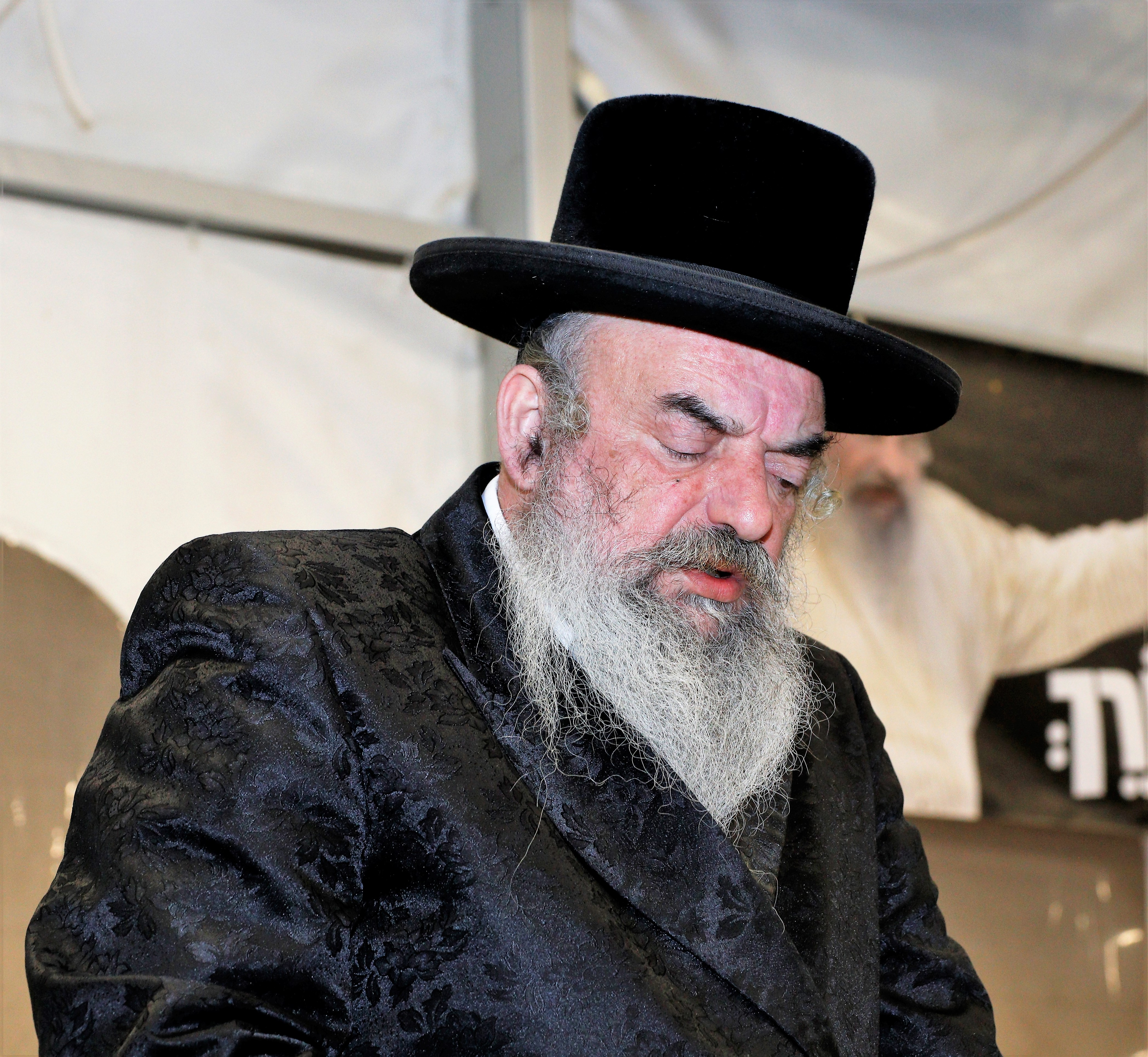 האדמו"ר מלעלוב בית שמש. חנוכה תש"פ